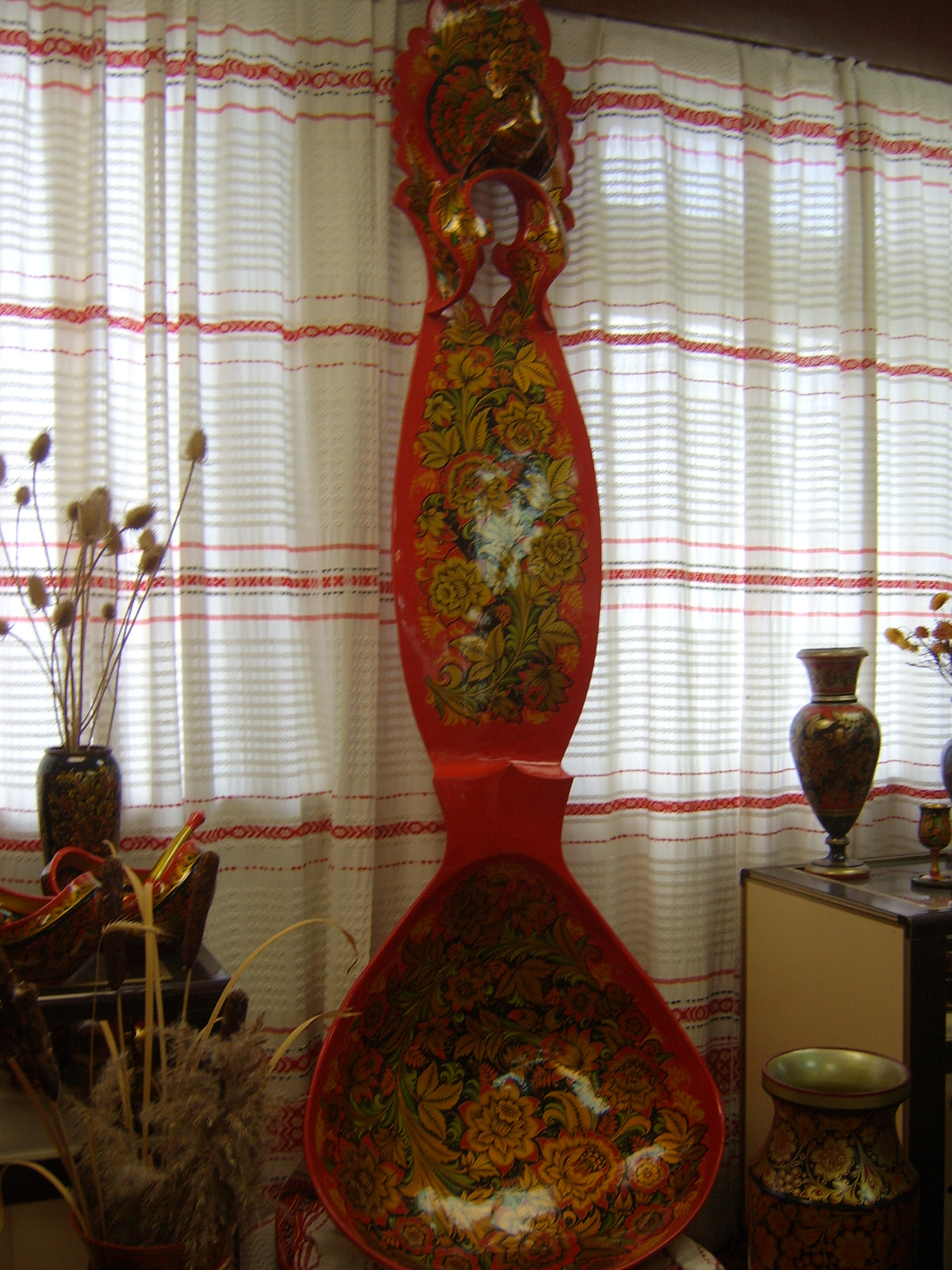 Touristenfotos von Nischni Nowgorod